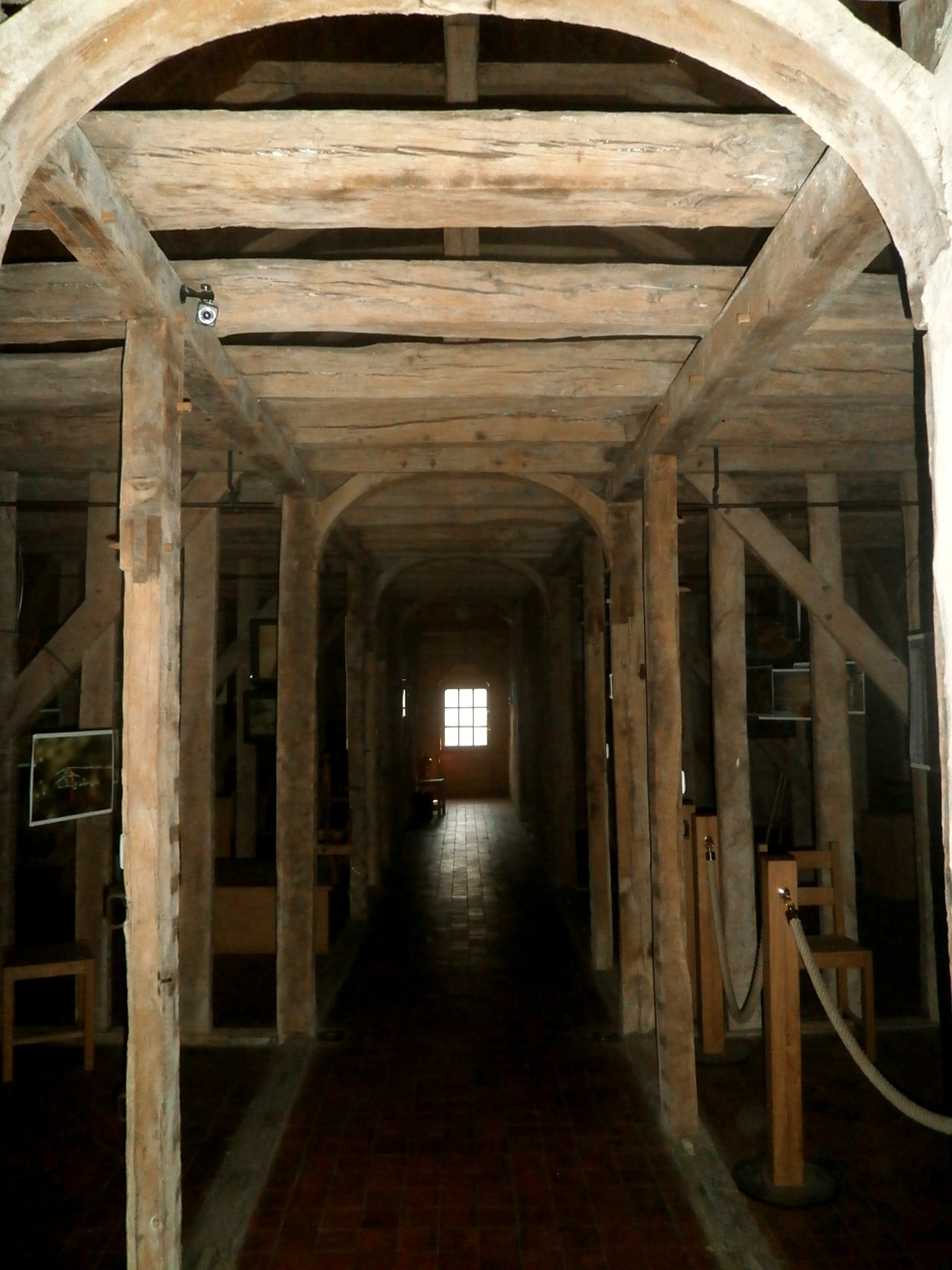 Charpente de la halle aux laines.